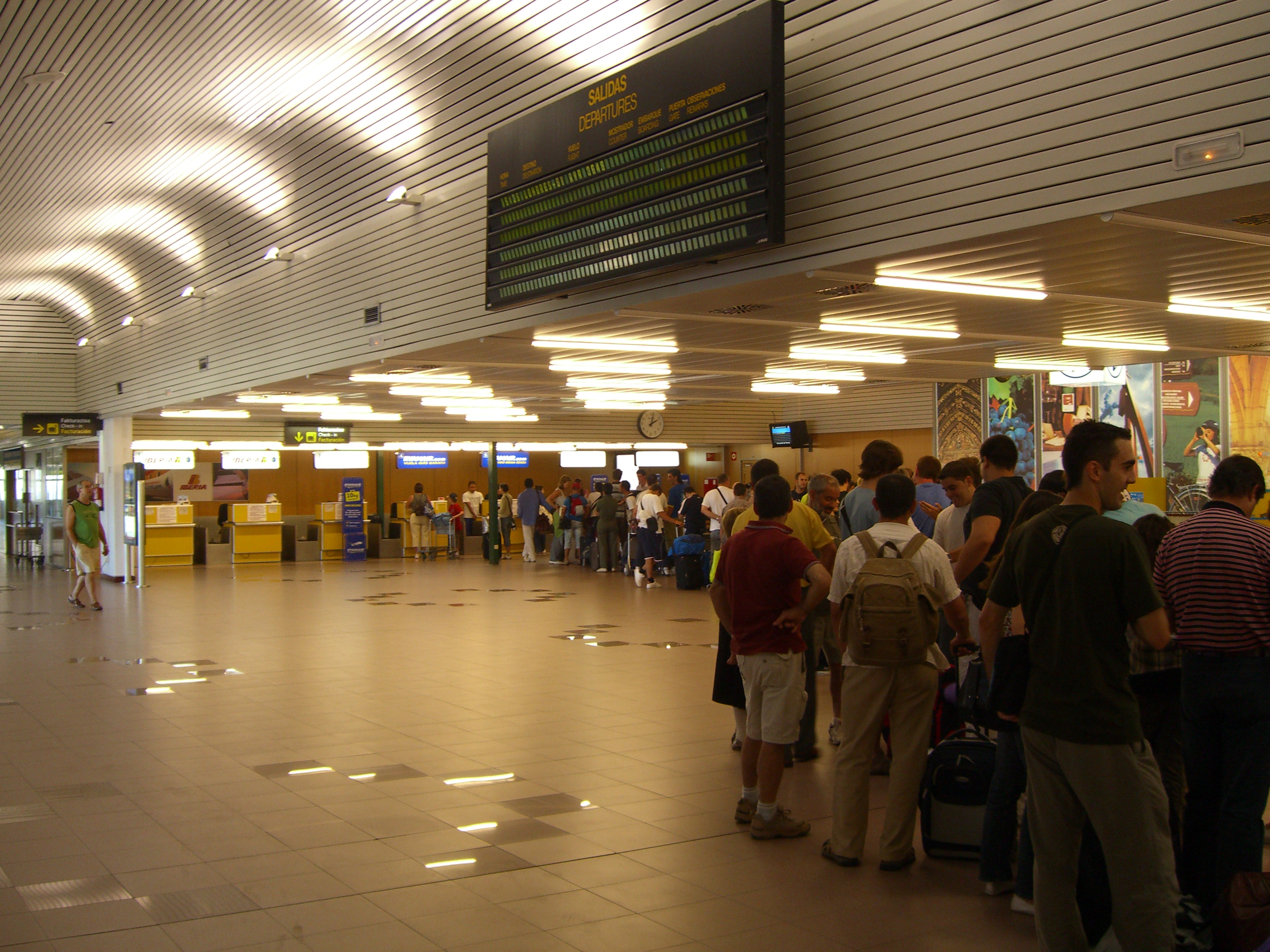 Vista del interior de la terminal del Aeropuerto de Vitoria. Sala de facturación.